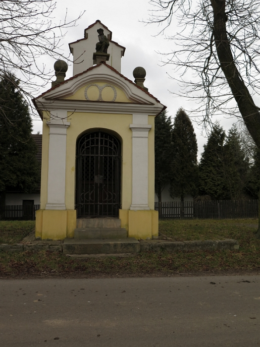 Kaple, Strachaly.